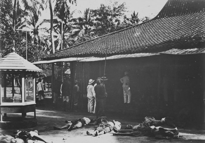 foto. Europeanen en Indonesiërs bij de slachtoffers die zijn gevallen tijdens de onderdrukking van een opstand te Kandangan op Java